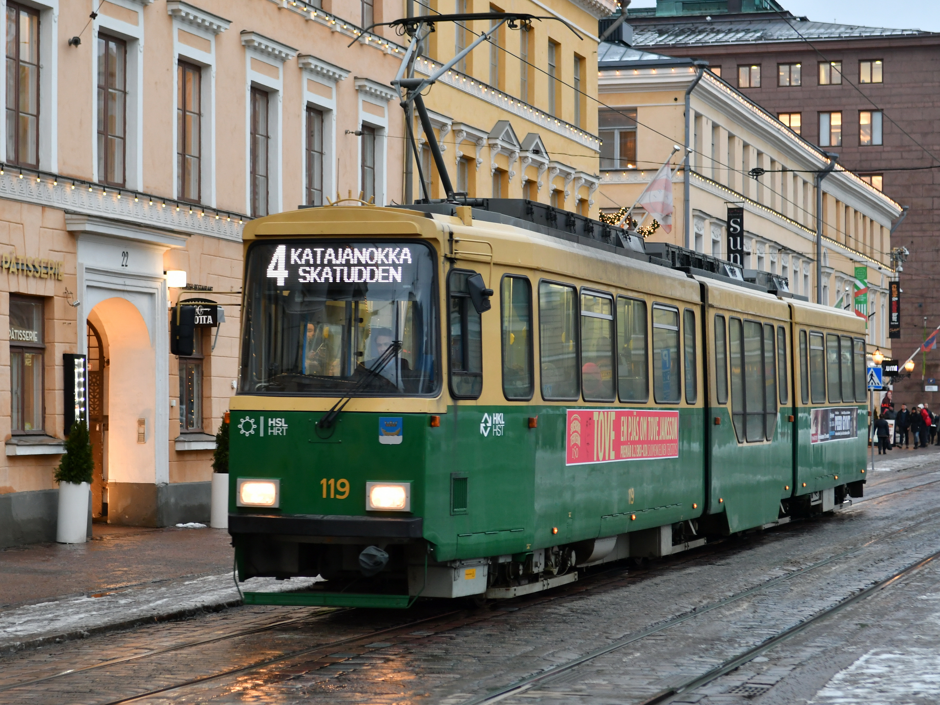 赫尔辛基电车（Car #119）